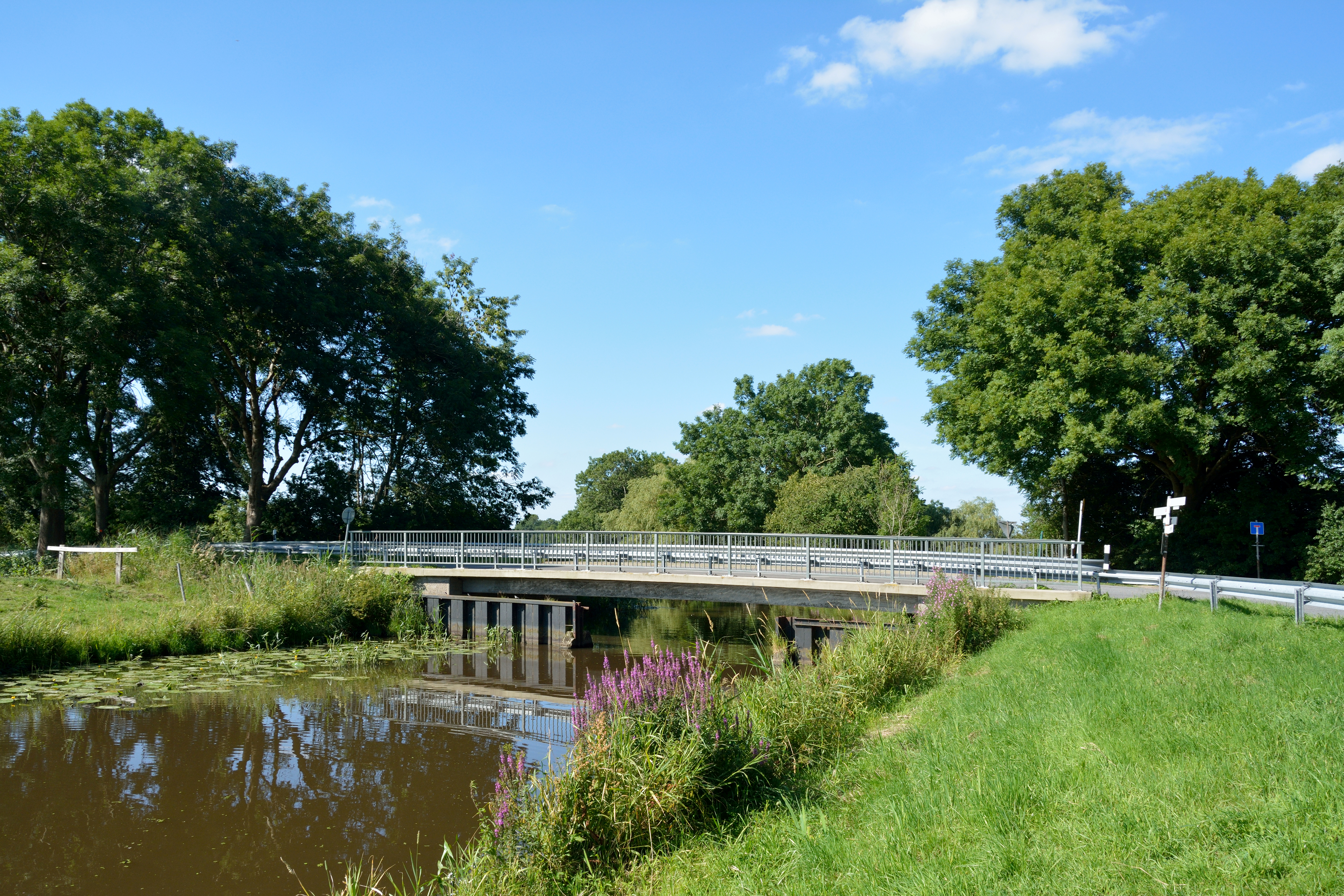 Die Wilsterau an der Landesstrasse 135 Die Brücke